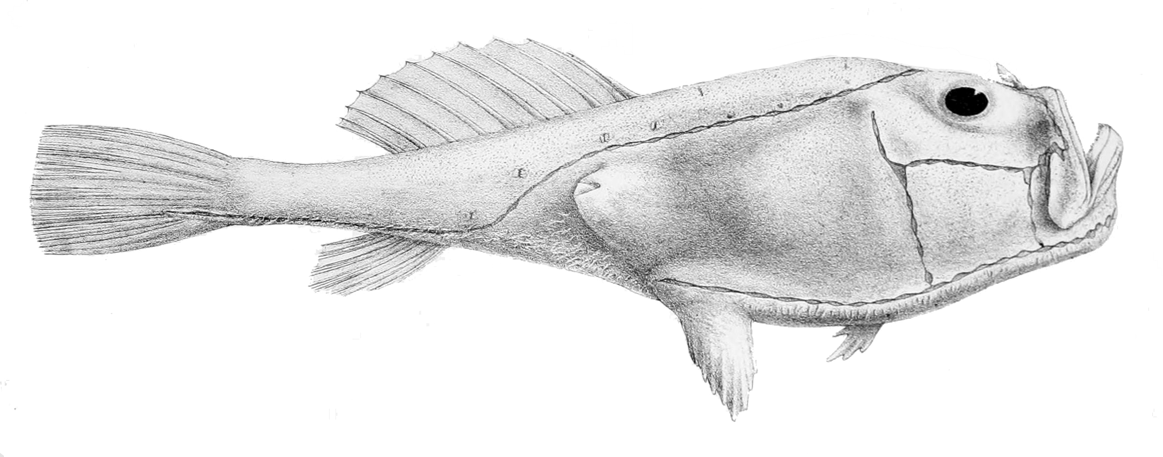 Chaunax pictus